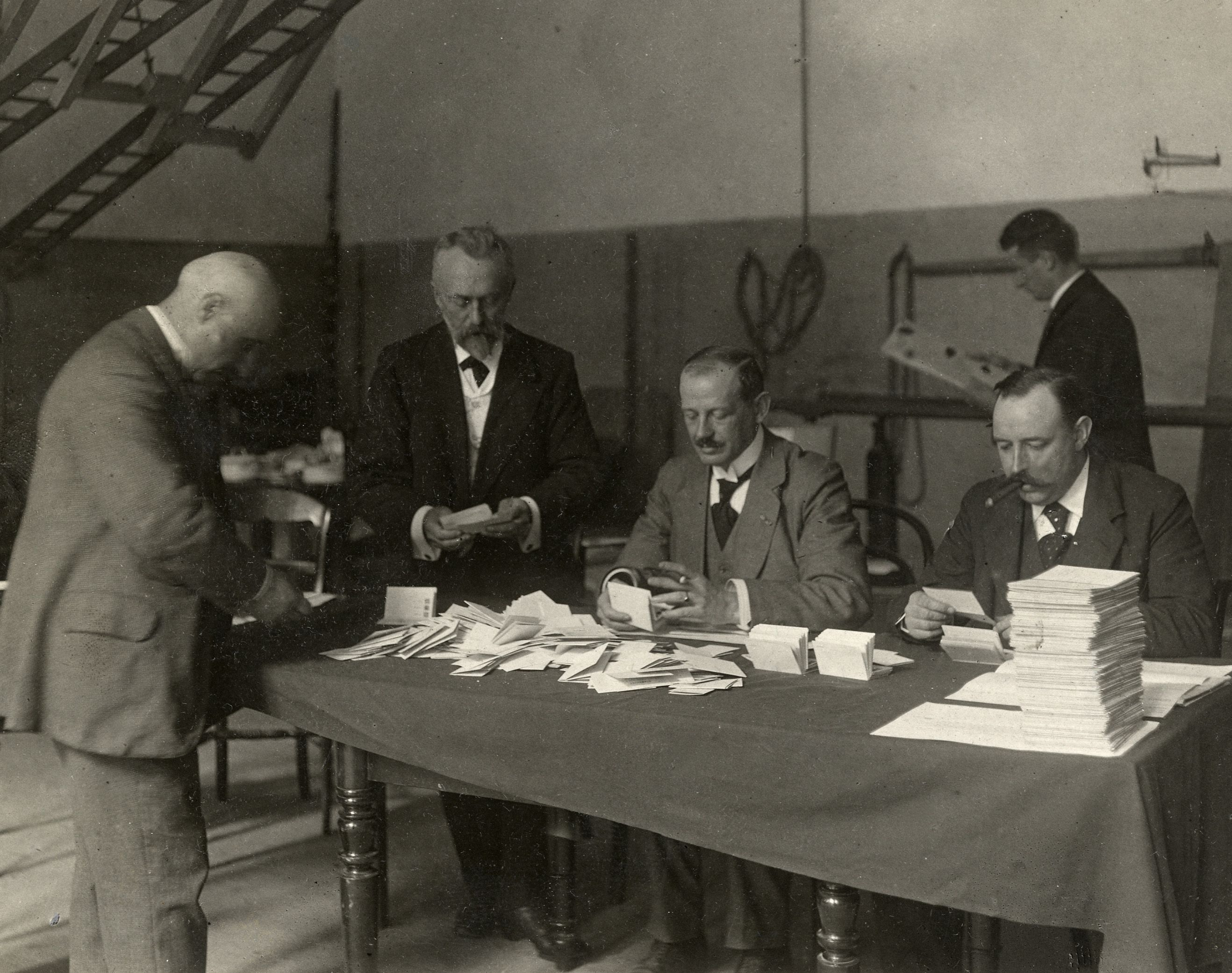 Verkiezingen. De leden van het stembureau tellen de stemmen na de verkiezingen voor de Tweede Kamer, Amsterdam 1913.